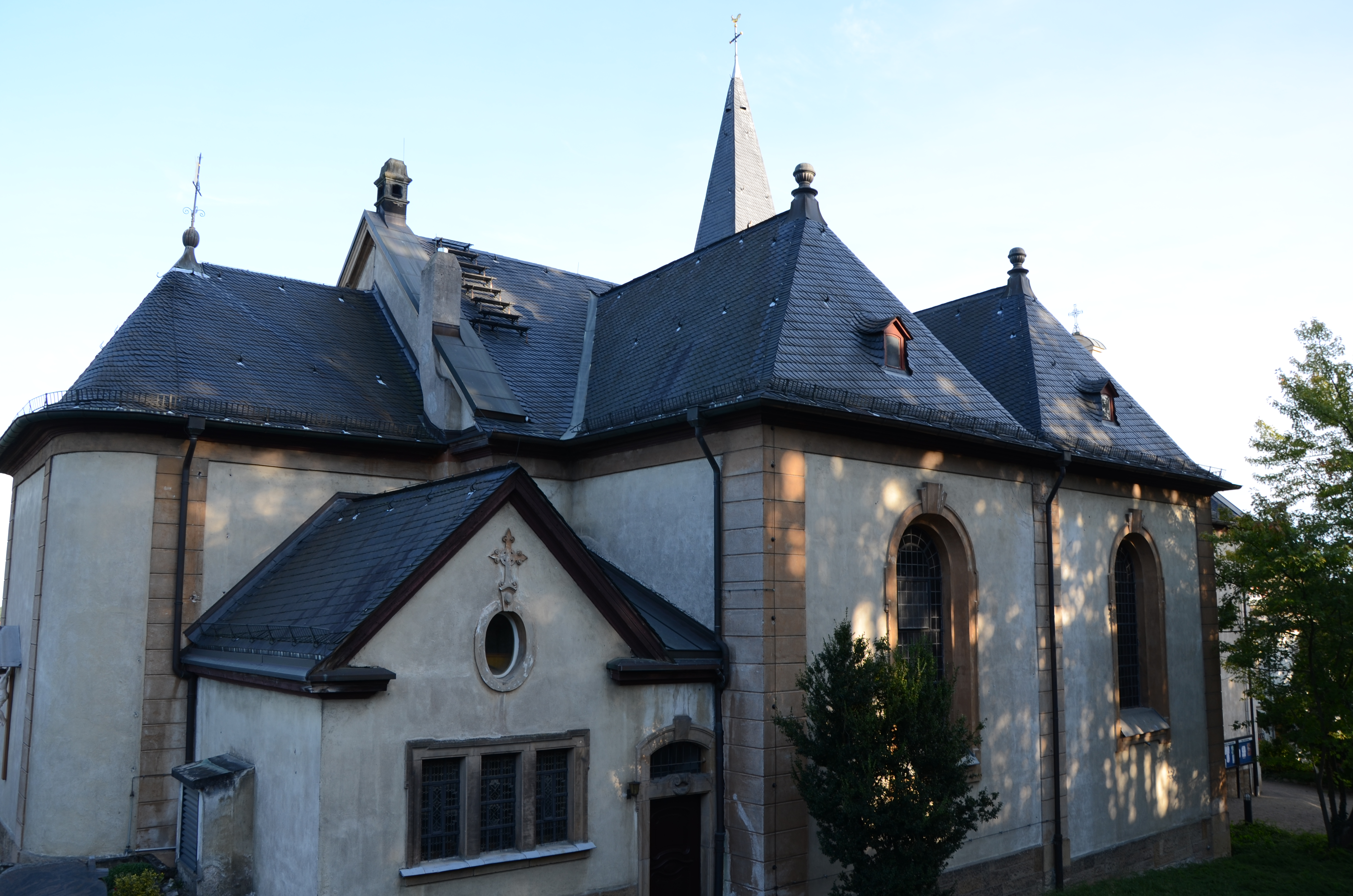 katholische Pfarrkirche Mariae Heimsuchung in Mainz-Laubenheim